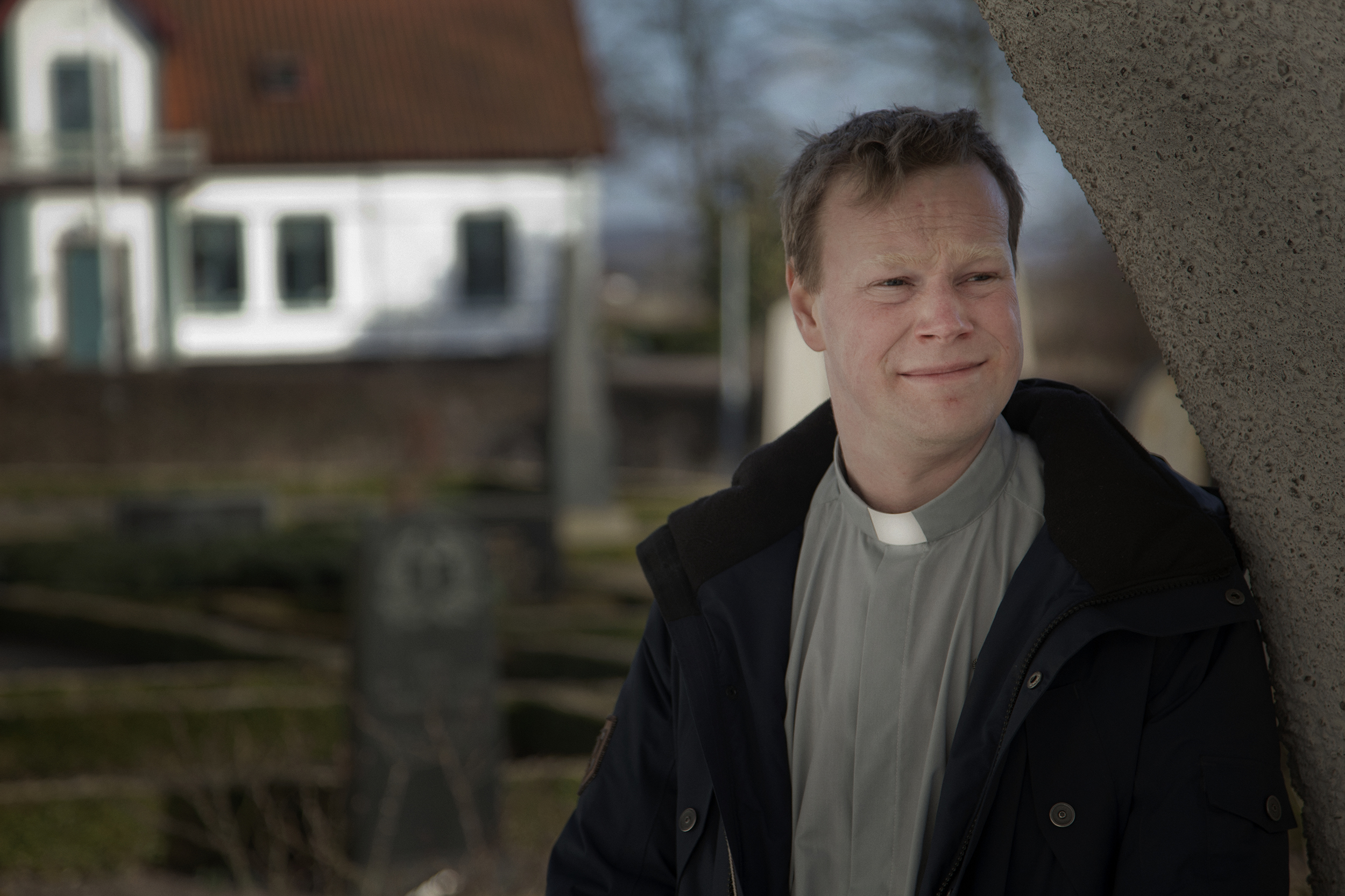 Komikern Johan Glans.